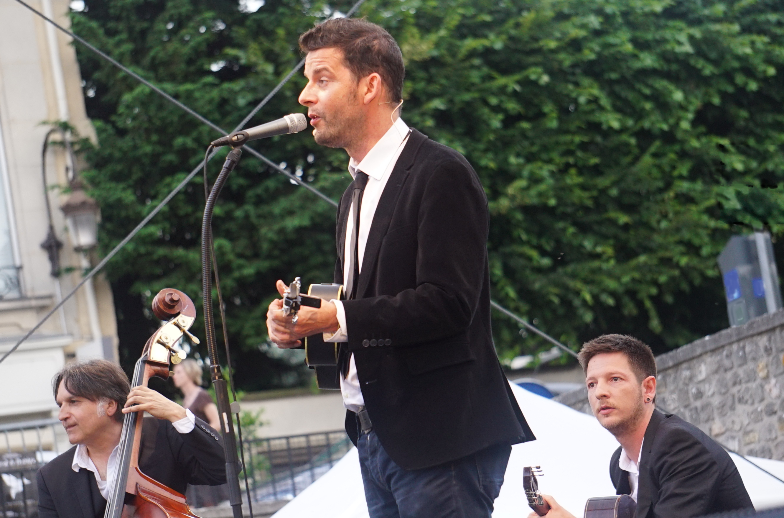 en concert à reims.